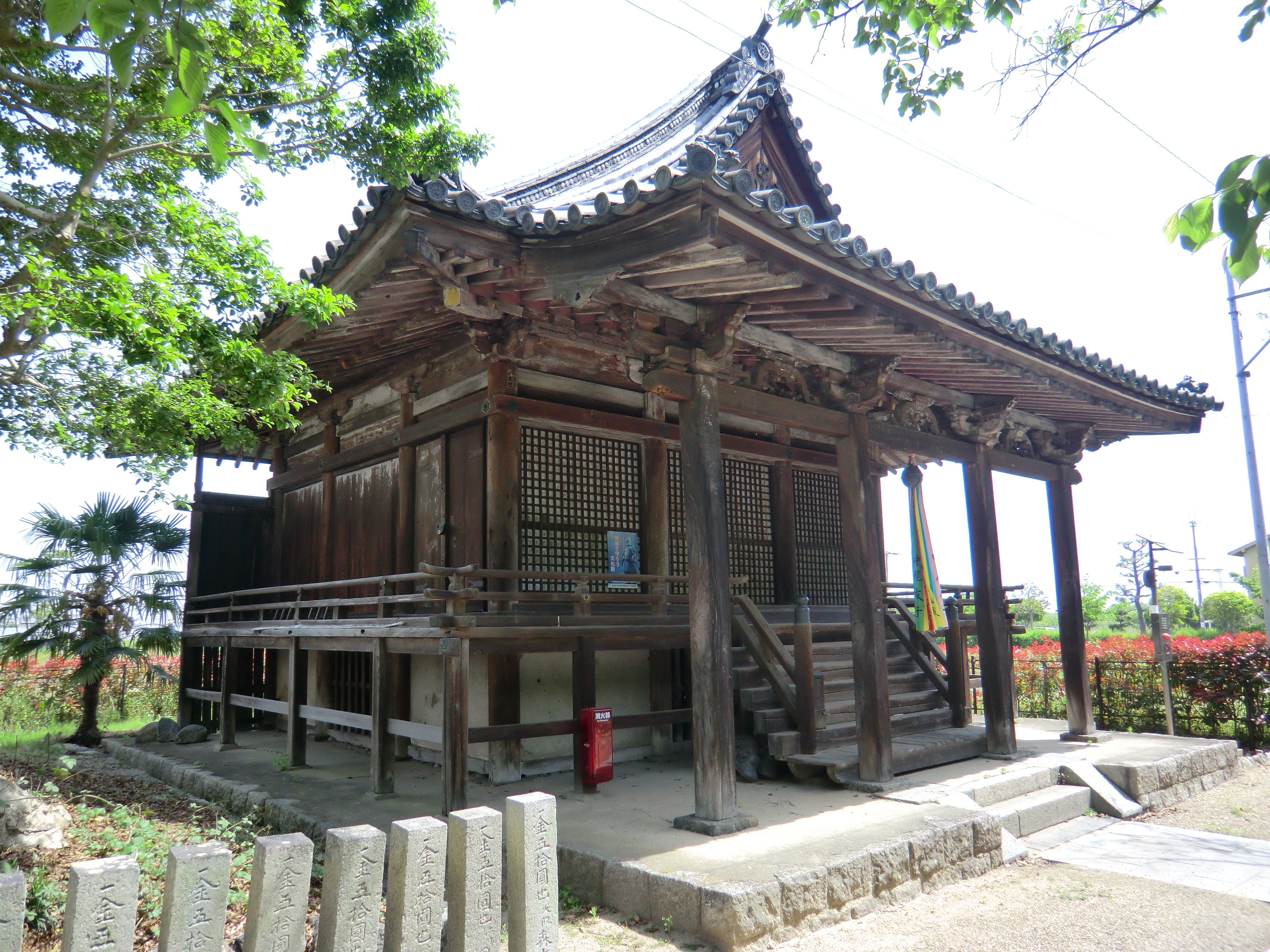 百済寺 (百濟寺) 大織冠 (奈良県北葛城郡広陵町大字百済)